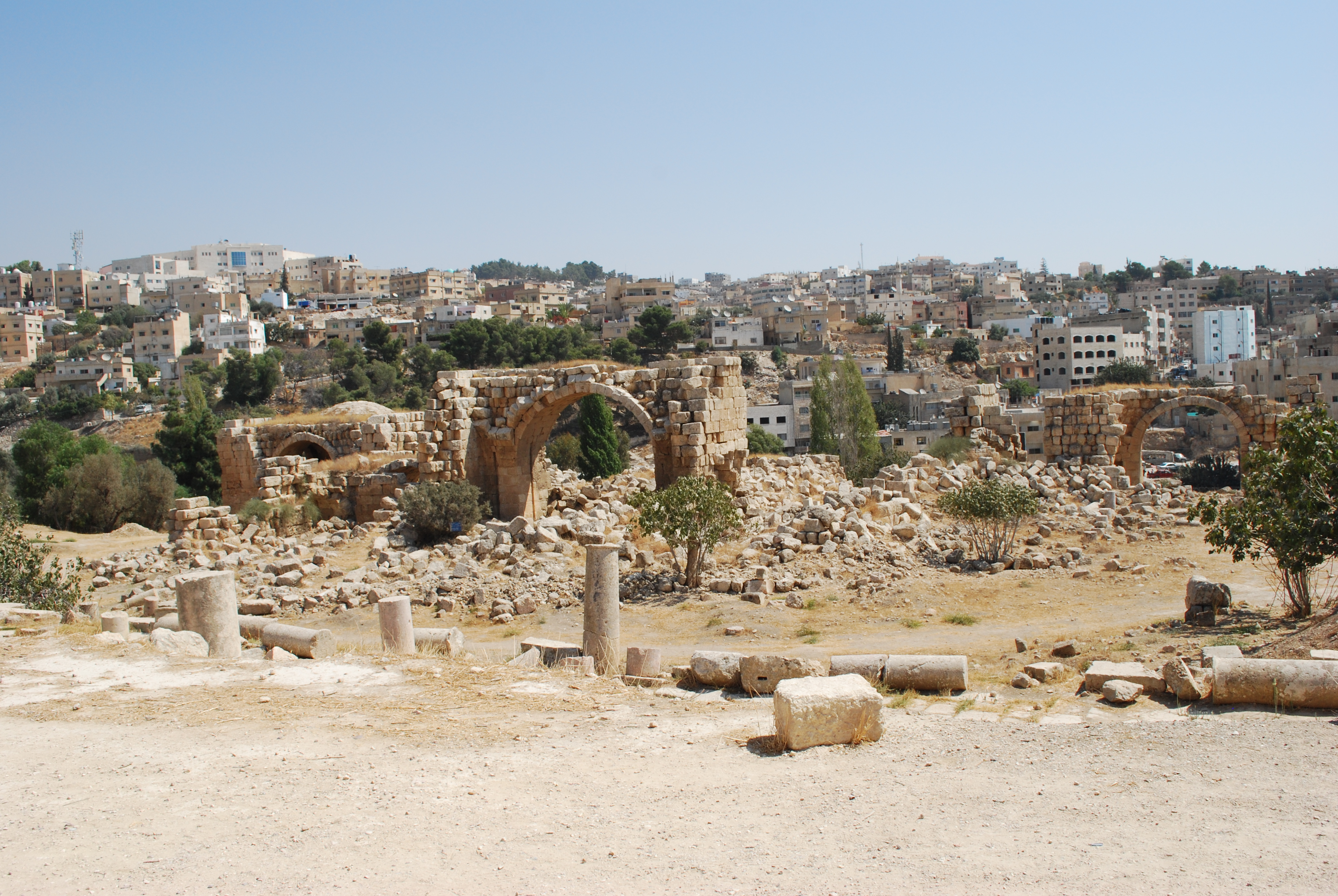 Les Bains ouest de Jerash.